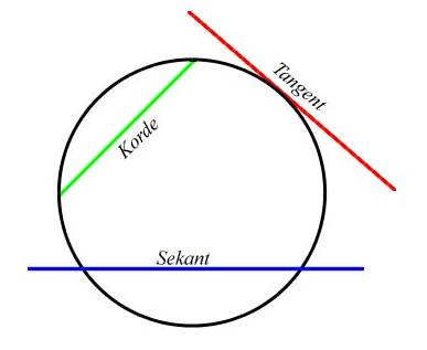 Beskrivelse av tangent, korde og sekant til en sirkel